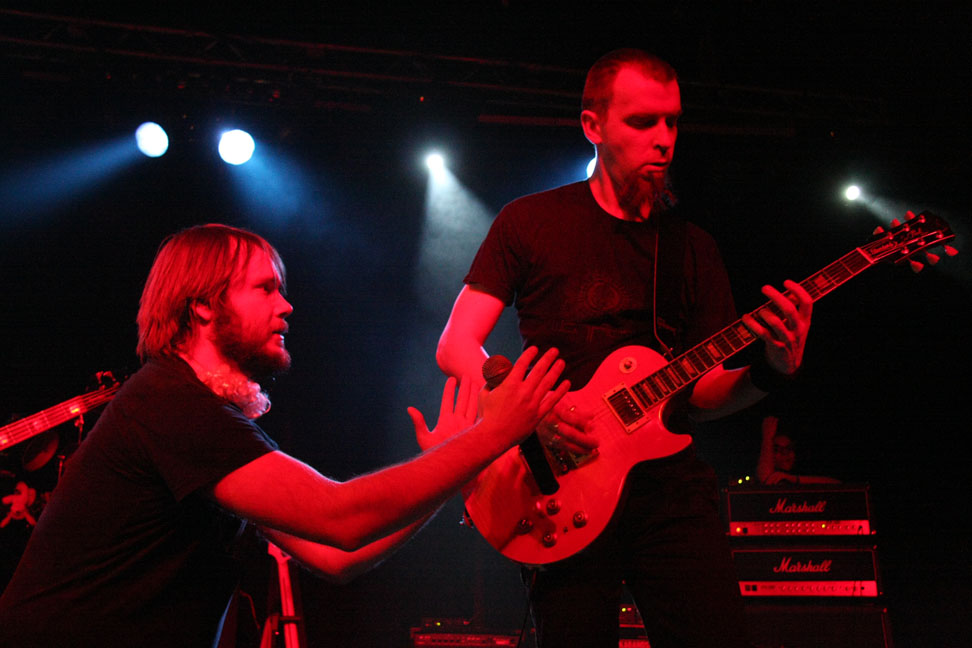 Zespół Kabanos w czasie Zacieraliów 6 stycznia 2012 r. w warszawskim klubie Progresja